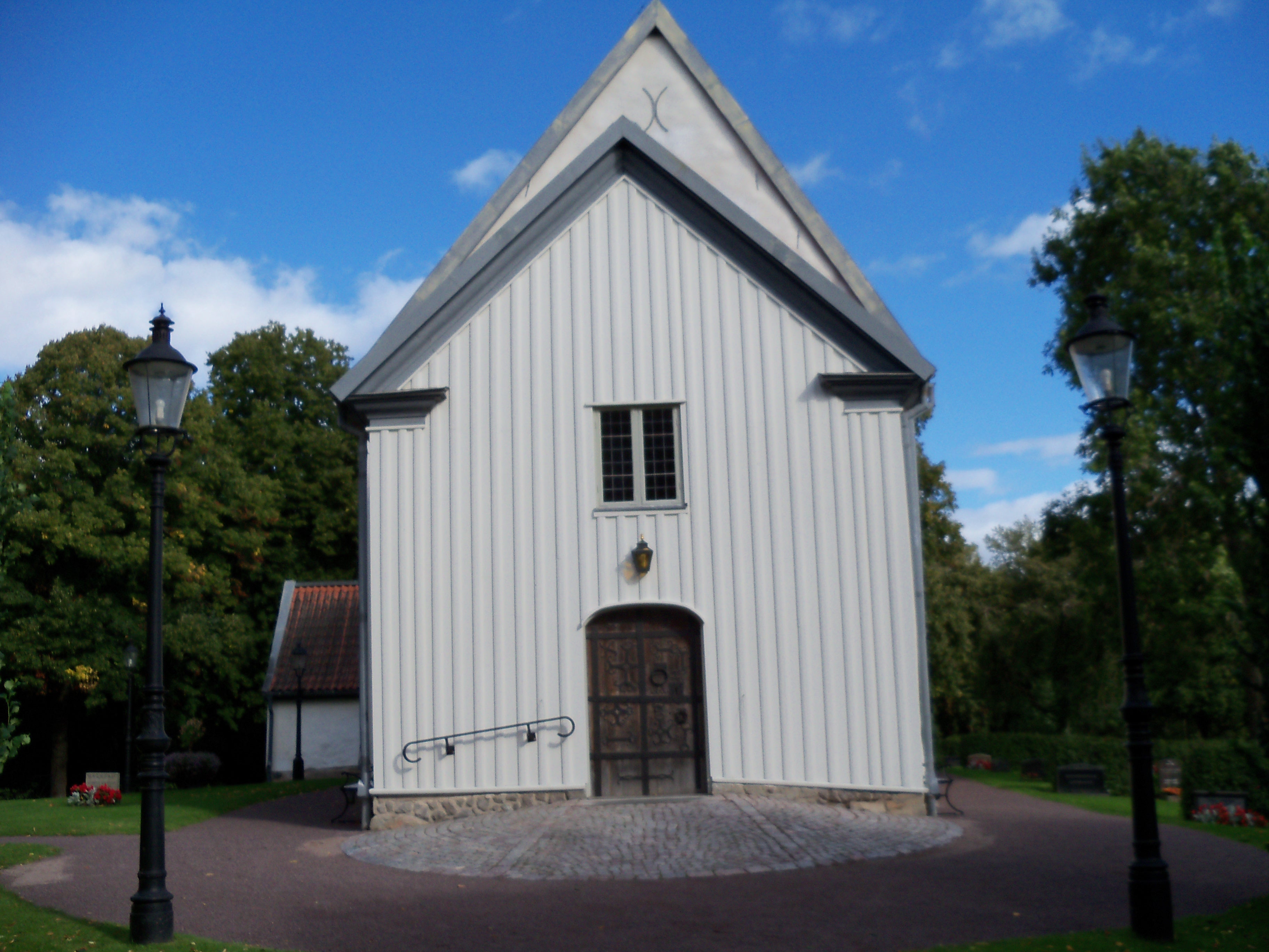 Sandseryds kyrka